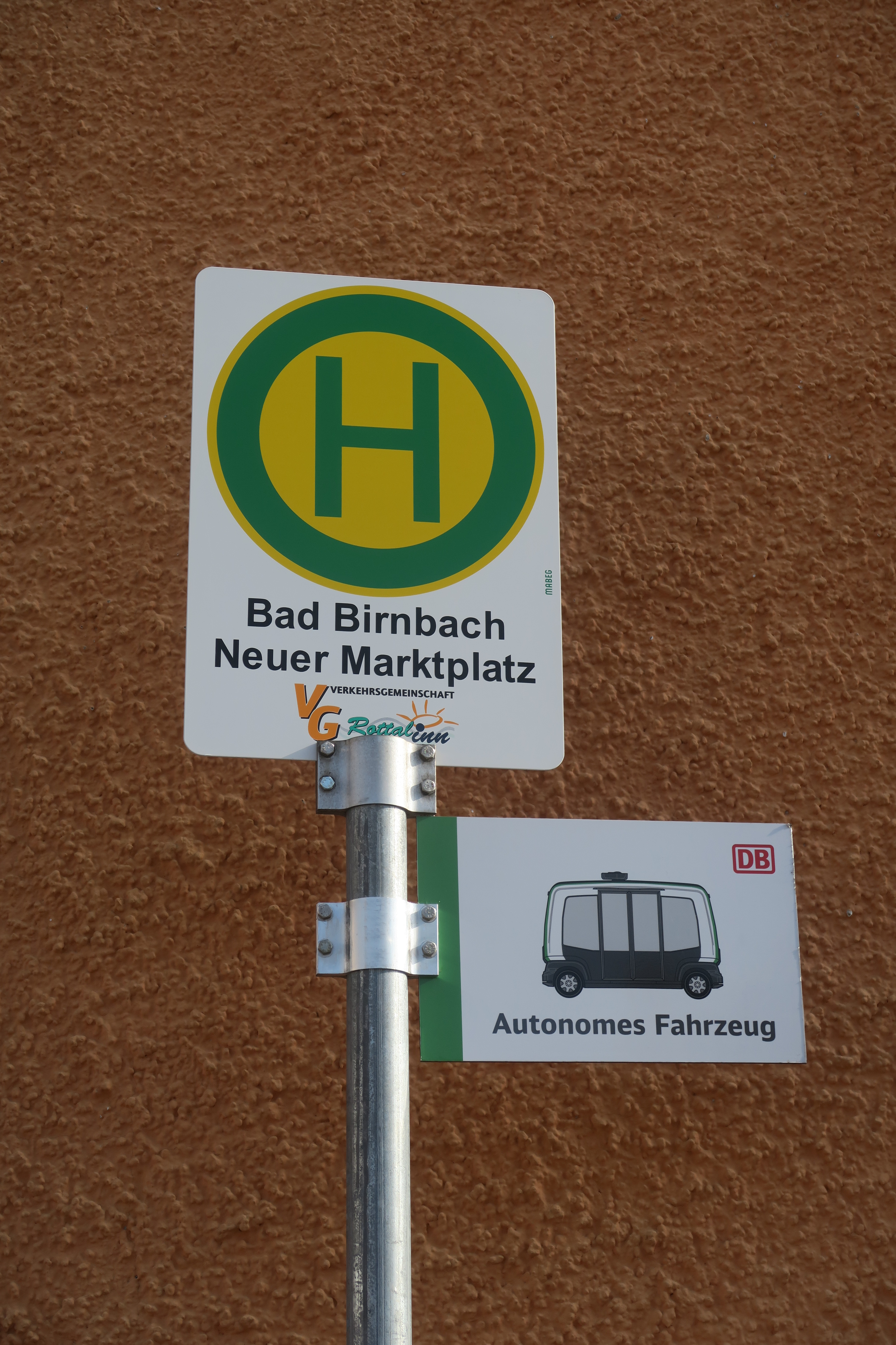 Autonomes Fahrzeug Bad Birnbach - Haltestellenschild